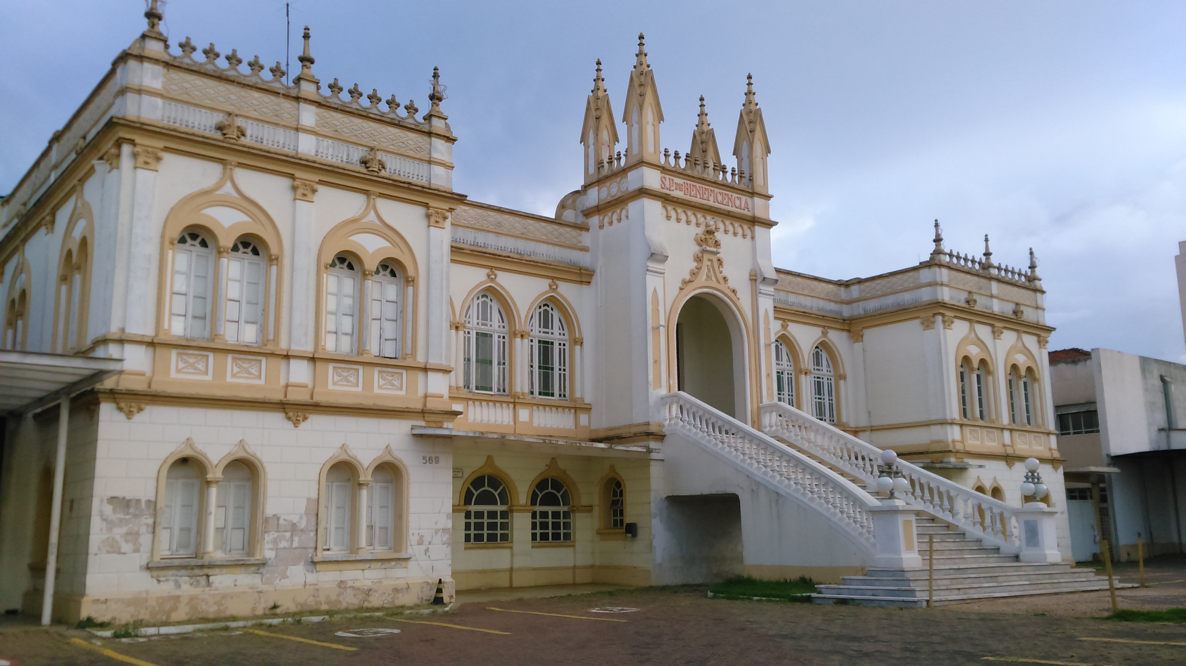 Fachada do hospital Beneficência portuguesa, antigamente no lugar do amarelo era azul claro.